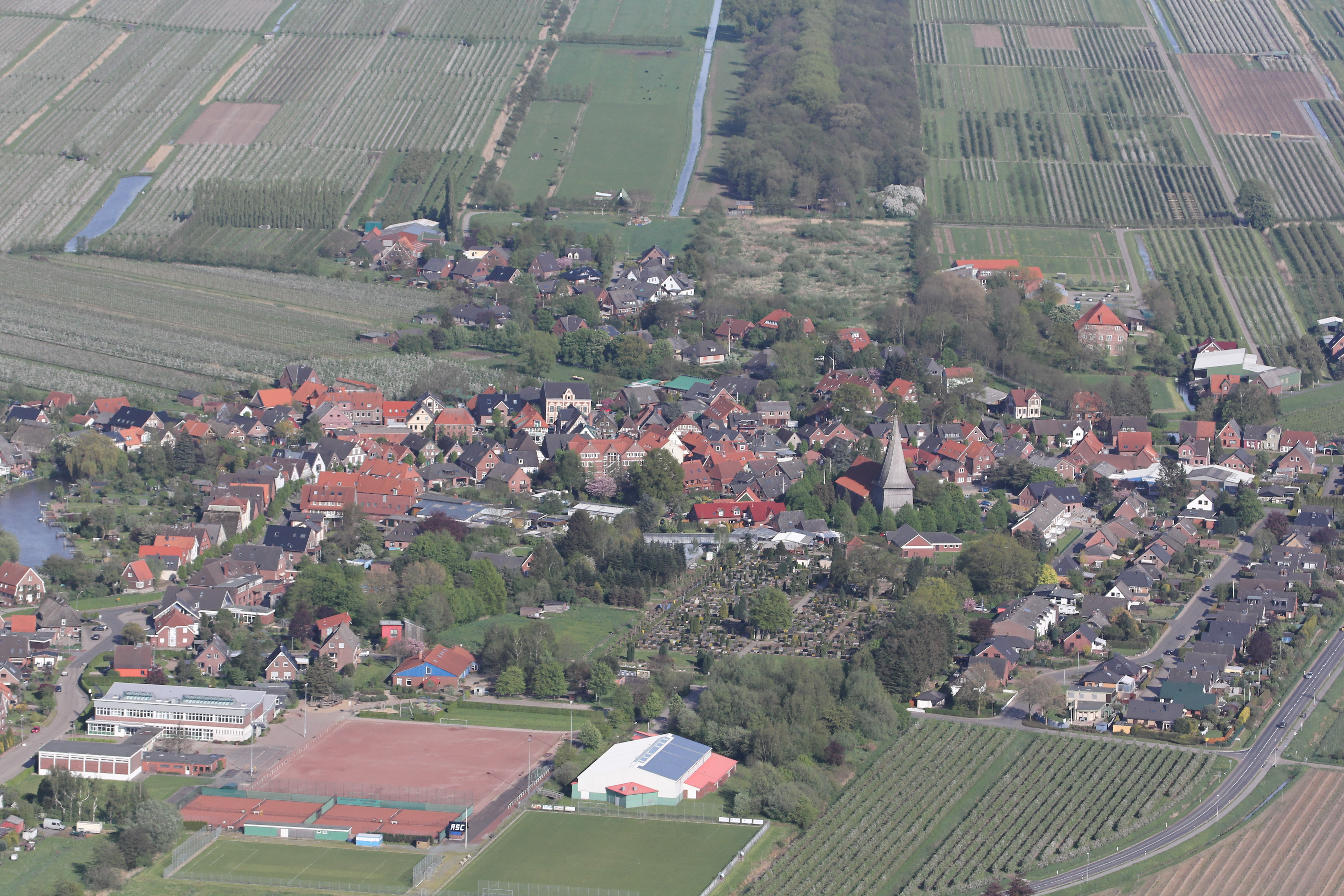 Der Ortsteil Estebrügge von Jork.